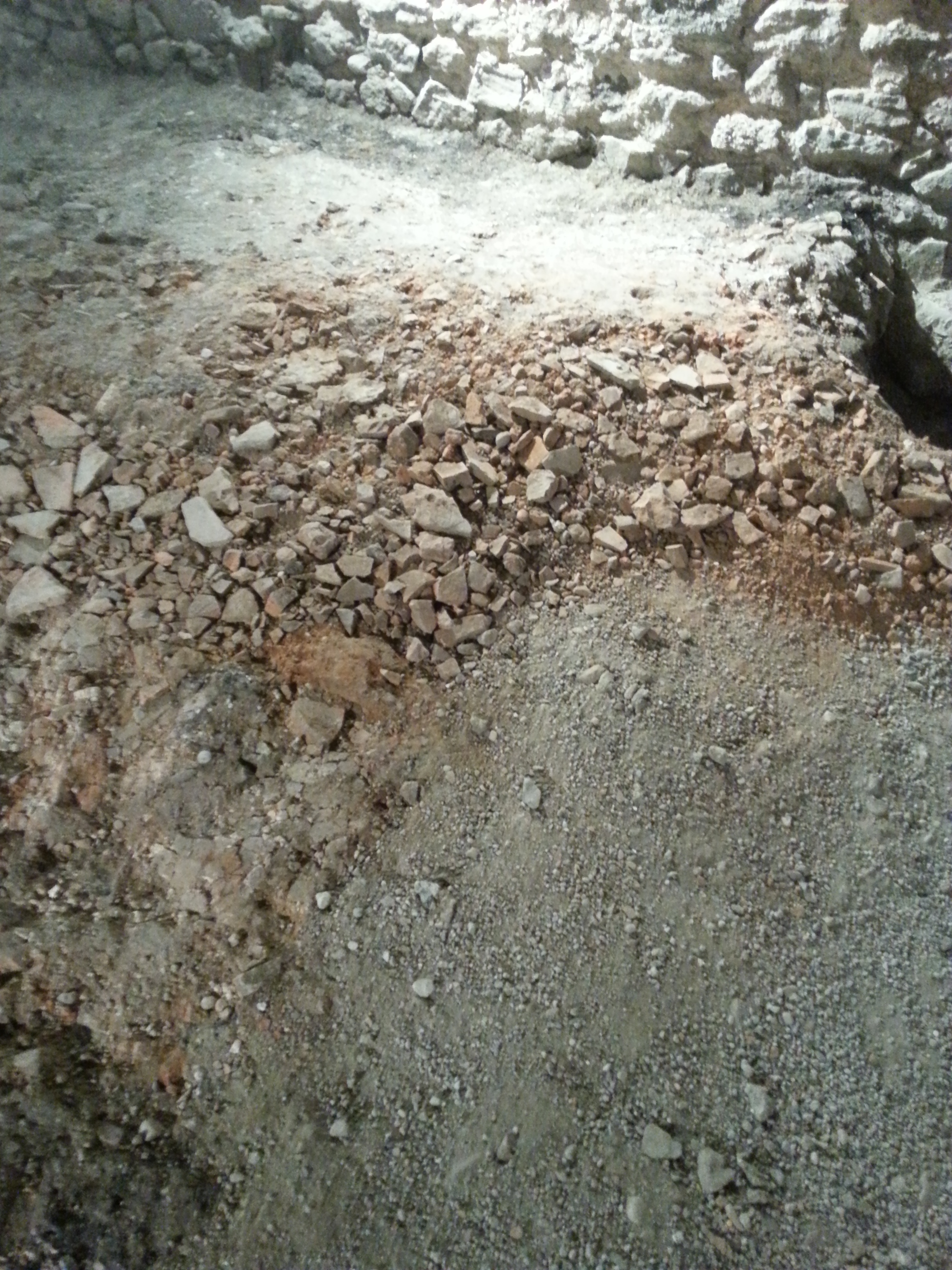 Restkastell Wallsee (A), Dachziegelbruch.